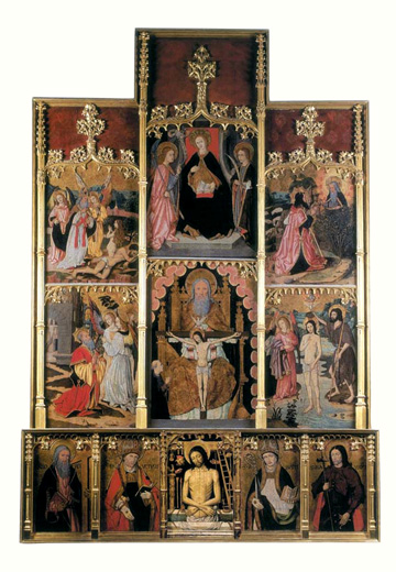 Retablo de la Santísima Trinidad (1506) por Antoni Marquès para la Basílica de Santa María de Manresa (Barcelona) Cataluña. Spain